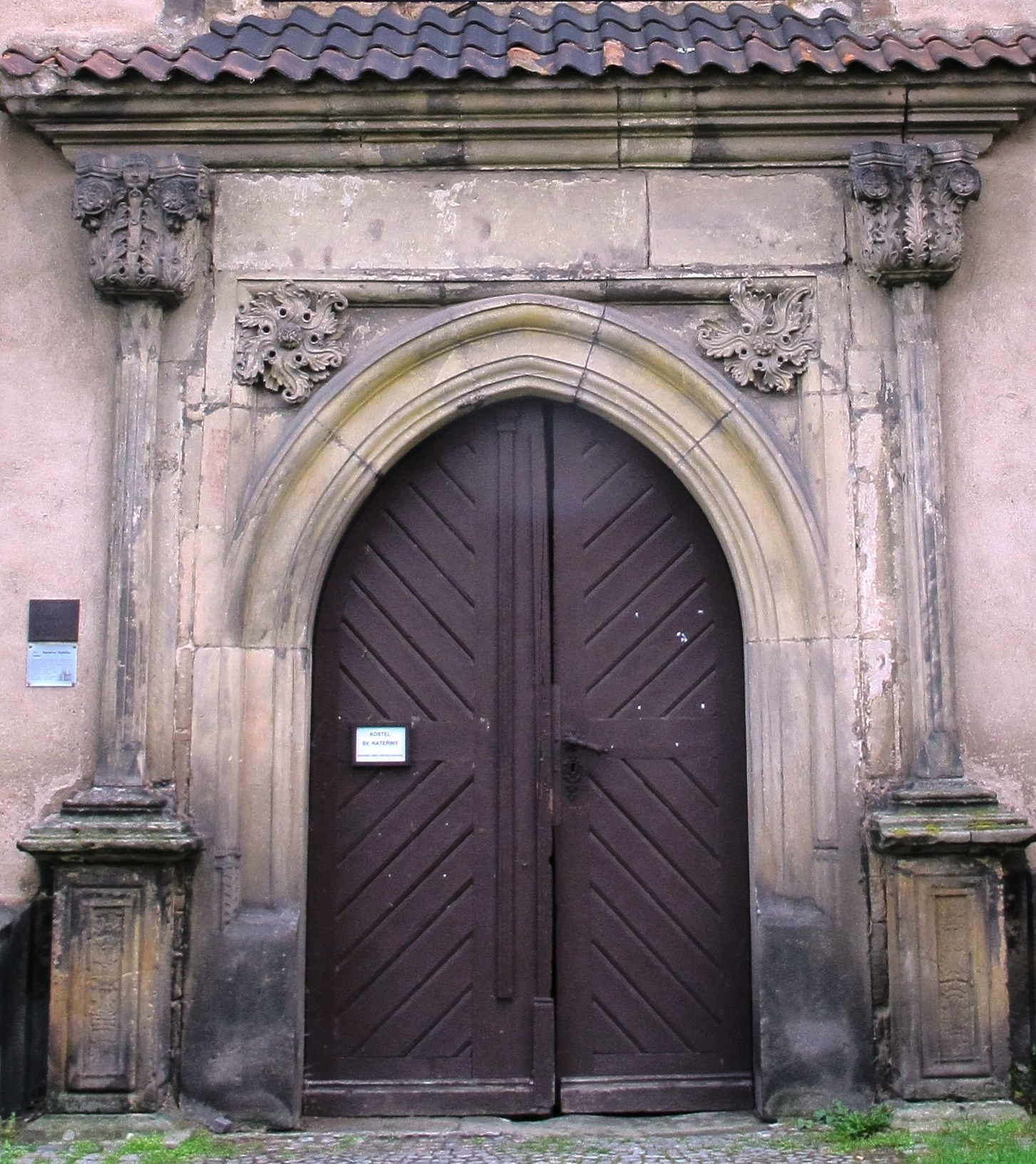 Česky: Chrudim, kostel sv. Kateřiny, hlavní západní portál